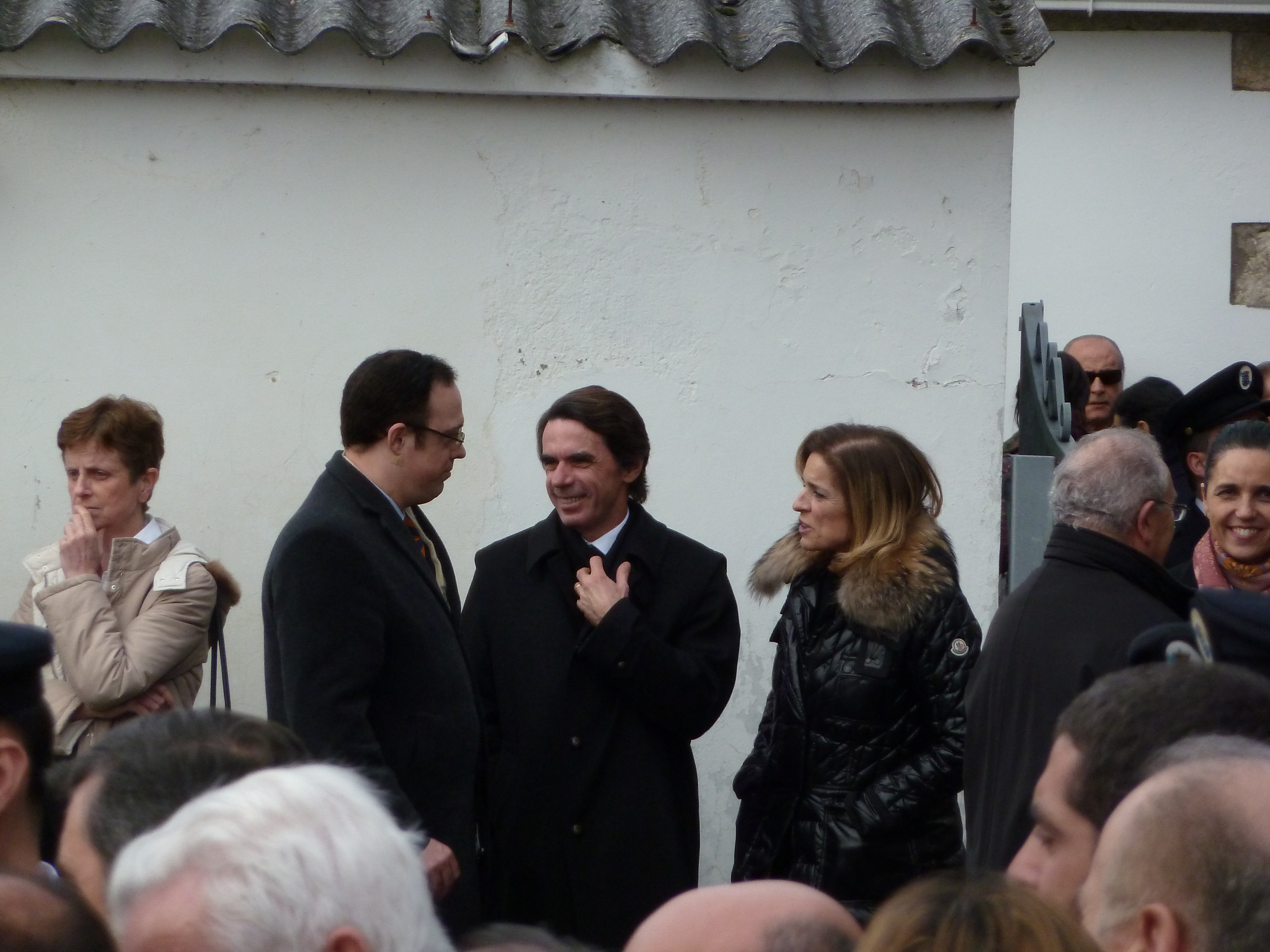 Enterro Fraga Perbes - Jose María Aznar, expresidente do goberno de España, Ana Botella, alcaldesa de Madrid, unha das fillas de Fraga e outros asistentes esperando a chegada do cadaleito.